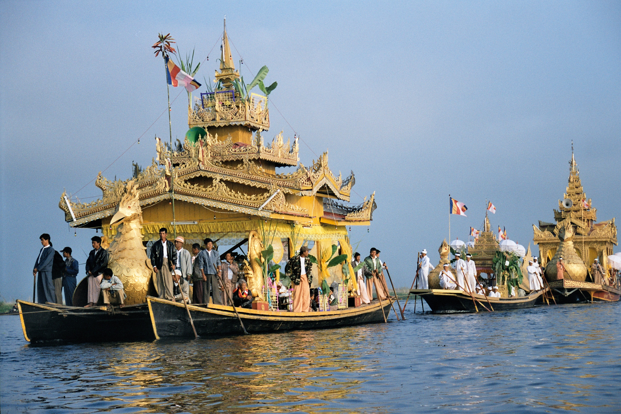 Inle aintzira